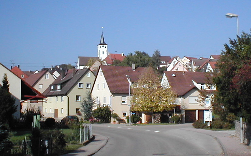 Ansicht von Lampoldshausen